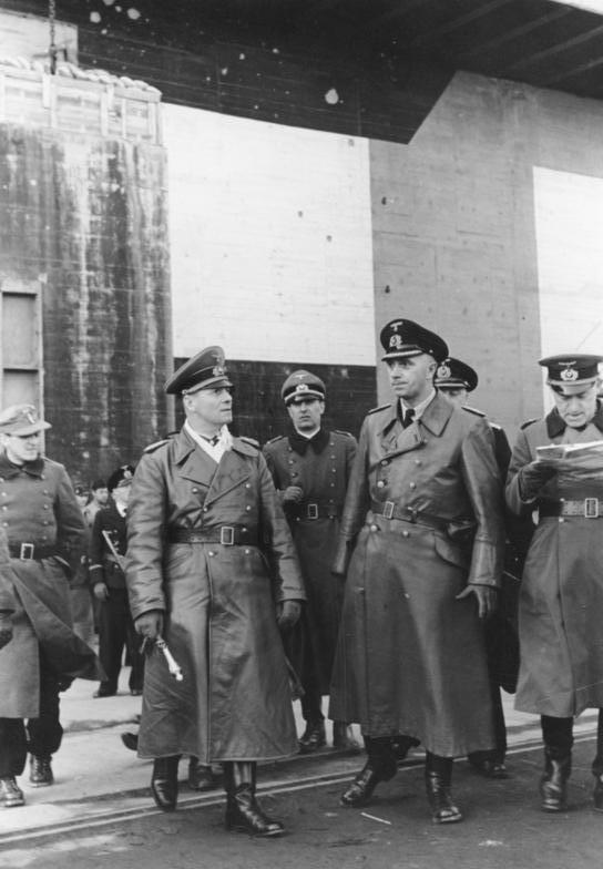 La Rochelle, 12.2.44 Generalfeldmarschall Rommel an der Biskaya. Feldmarschall Rommel vor einem der bombensicheren, riesigen Bunkern des U-Stützpunktes in La Rochelle H.KBZ.b.HGr.D., Film Nr. 198/32, Bildberichter: Jesse